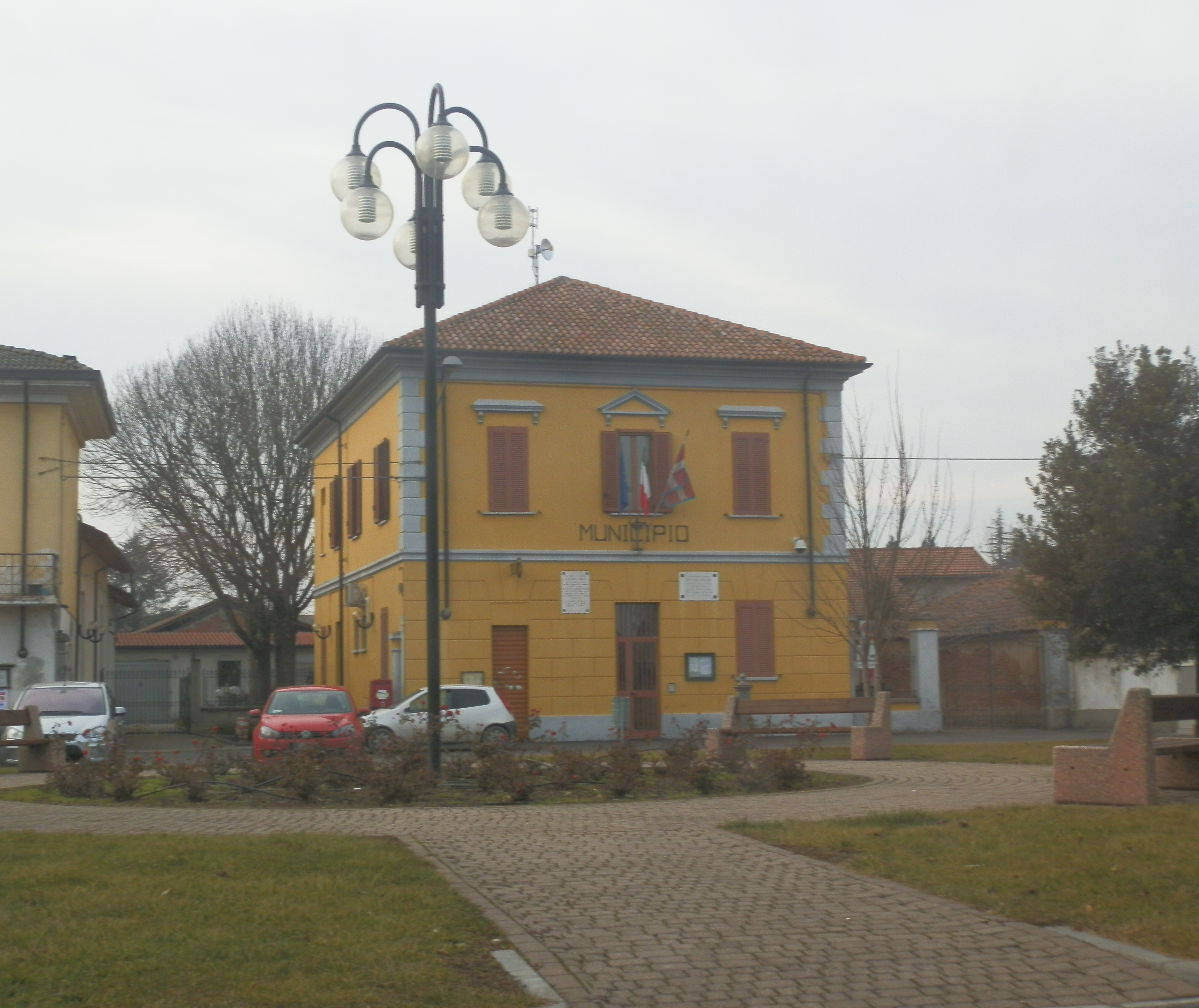 Municipio di Alzano Scrivia